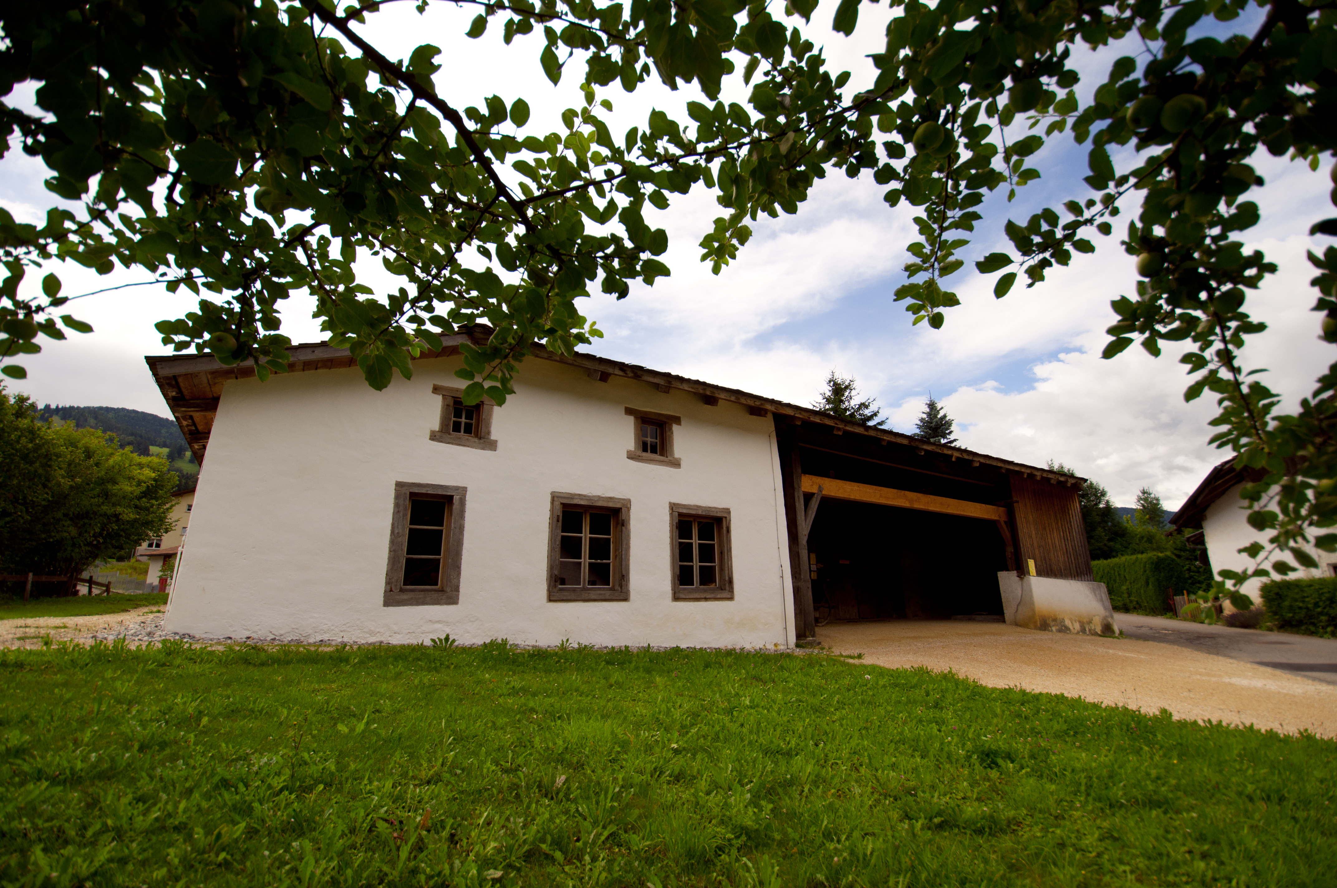 Haus des Venners Wisard (Avant)